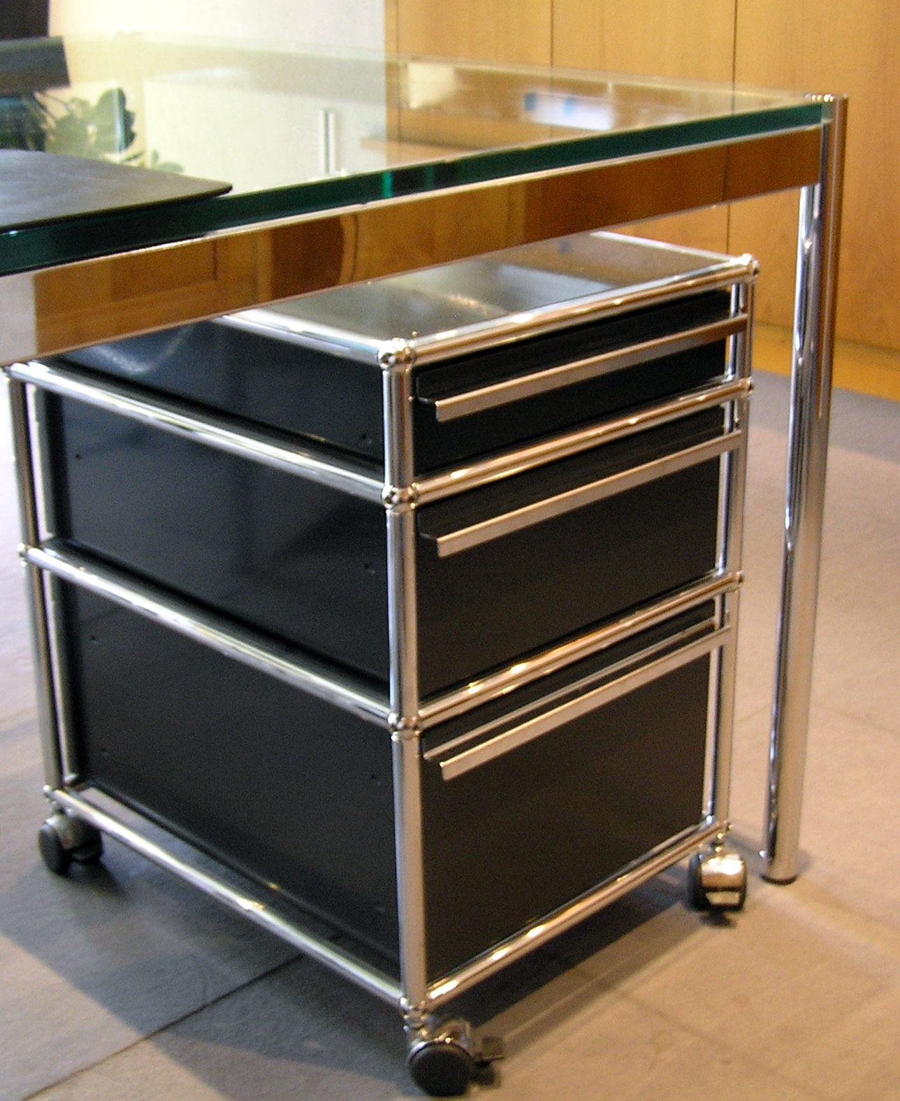 USM Haller